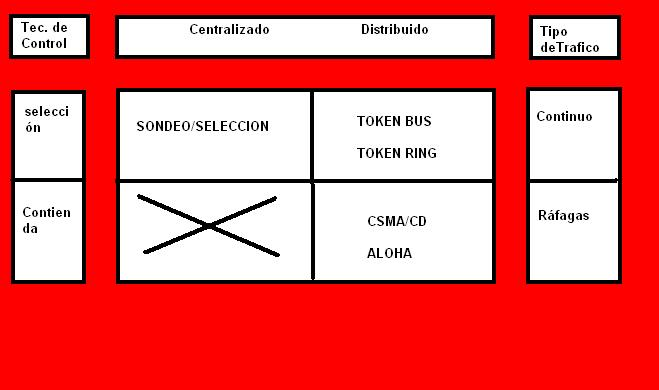 Imagen